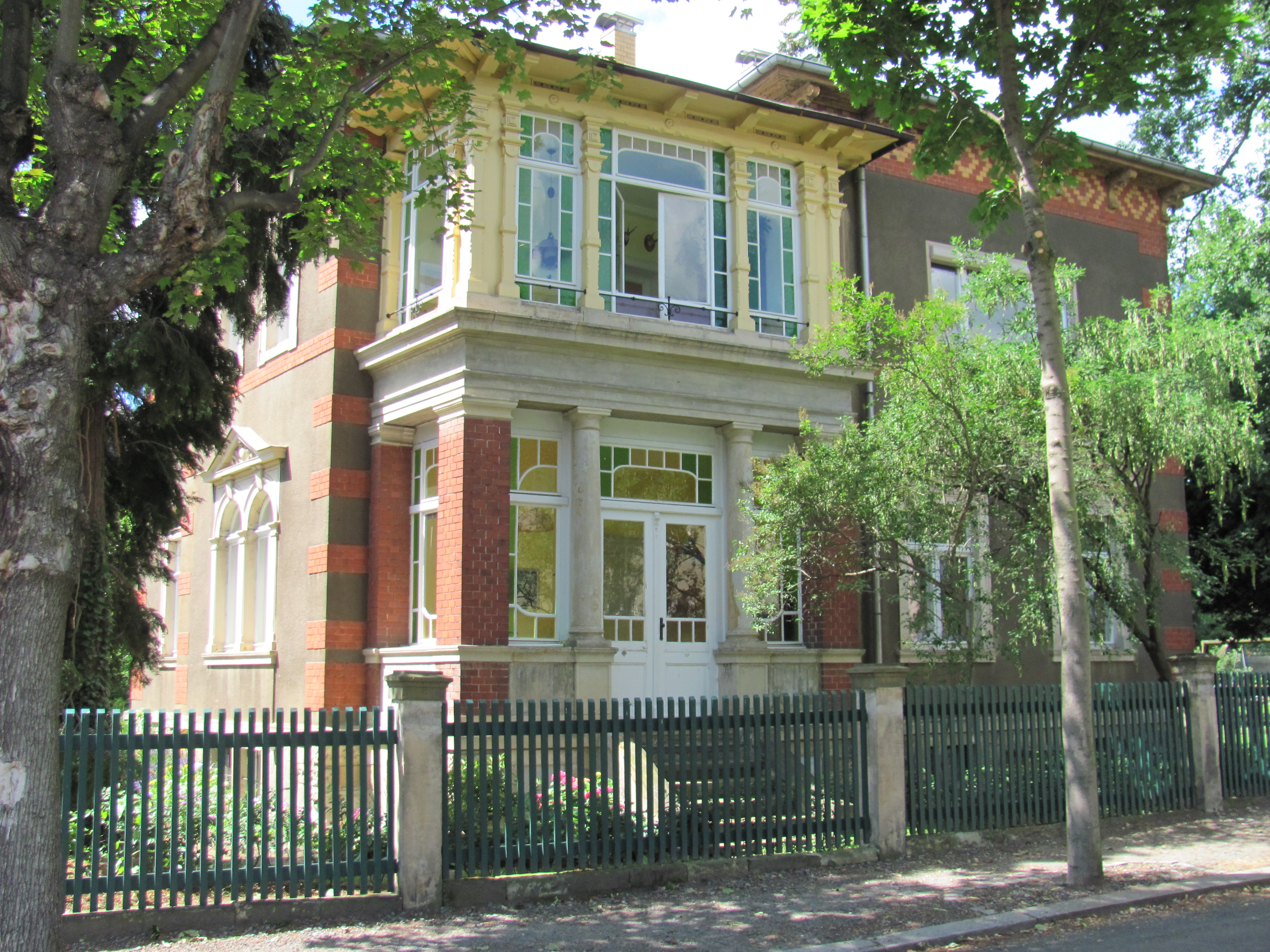 Fehlende Kulturdenkmale nach Wikipedialiste in Heinrich-Heine-Straße, Horst-Vieth-Straße, Humboldtstraße, Dr-Rudolf-Friedrichstraße